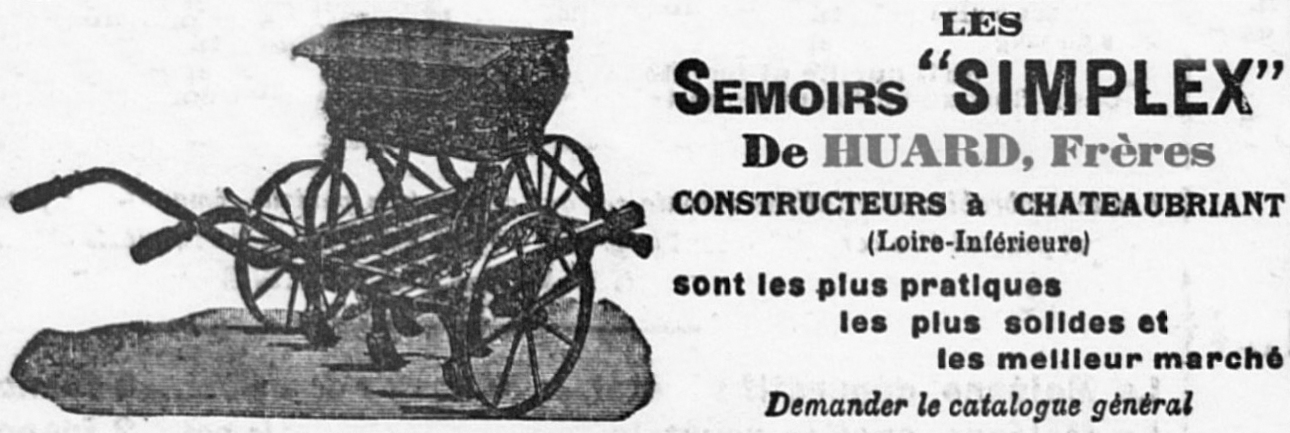 Encart publicitaire pour les Semoirs Simplex de la société Huard Frères, parue dans le quotidien Ouest-Éclair